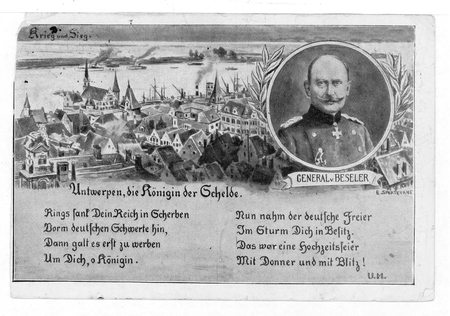 Postkarte aus WW I. Antwerpen, die Königin der Schelde und Generaloberst Hans Hartwig von Beseler